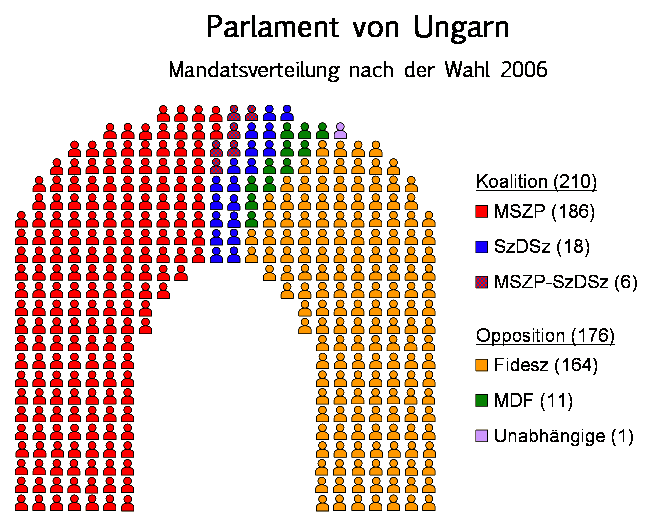 Die Grafik zeigt die Sitzverteilung im ungarischen Parlament nach den Wahlen 2006. Die ungewöhnliche Form ist der des echten Sitzungssaales nachempfunden.